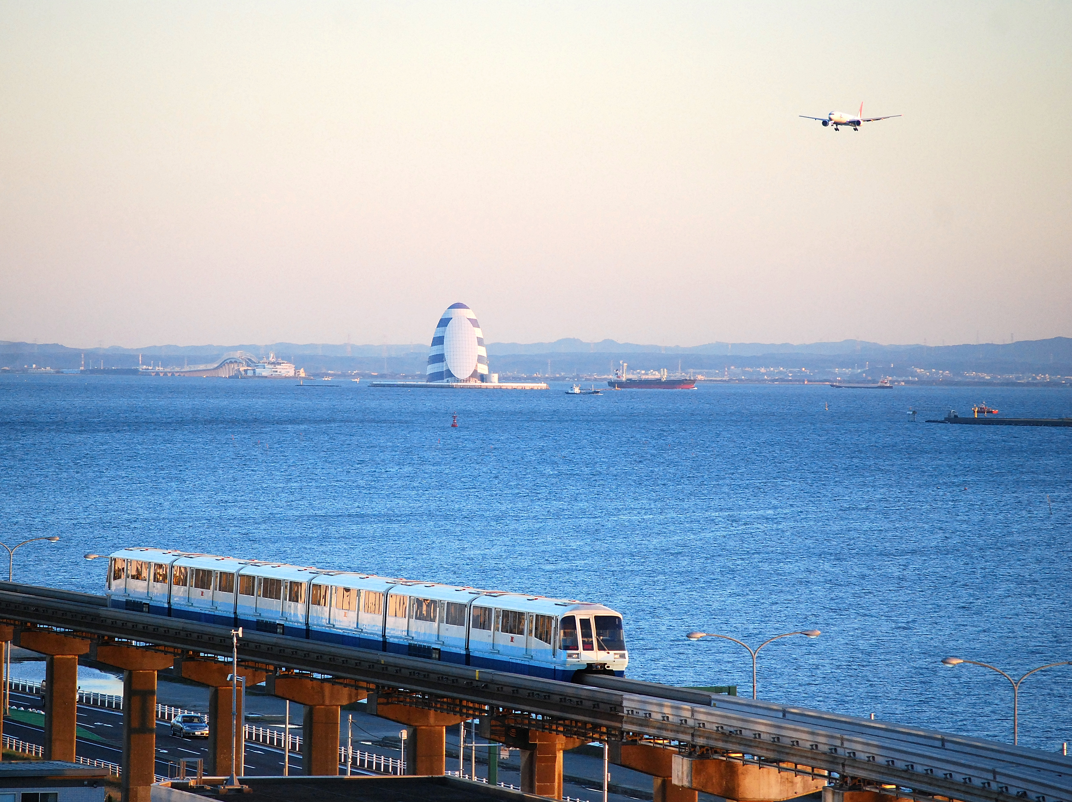 東京モノレールとJALの旅客機、遠くにアクアラインの風の塔（川崎人工島）が見える。